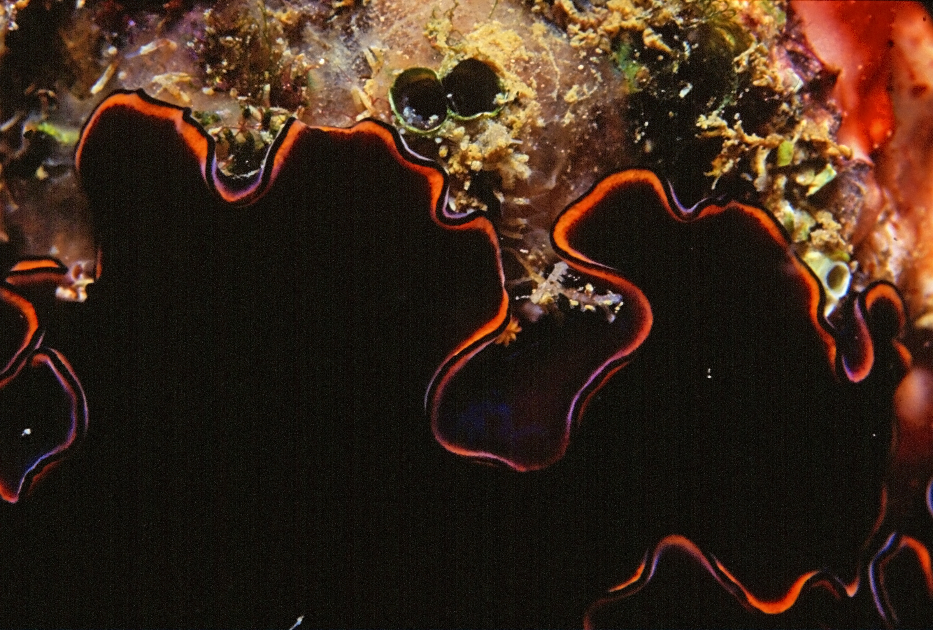 Pseudobiceros hymanae Newman & Cannon, 1997 - Banyuls-sur-Mer : 07/94